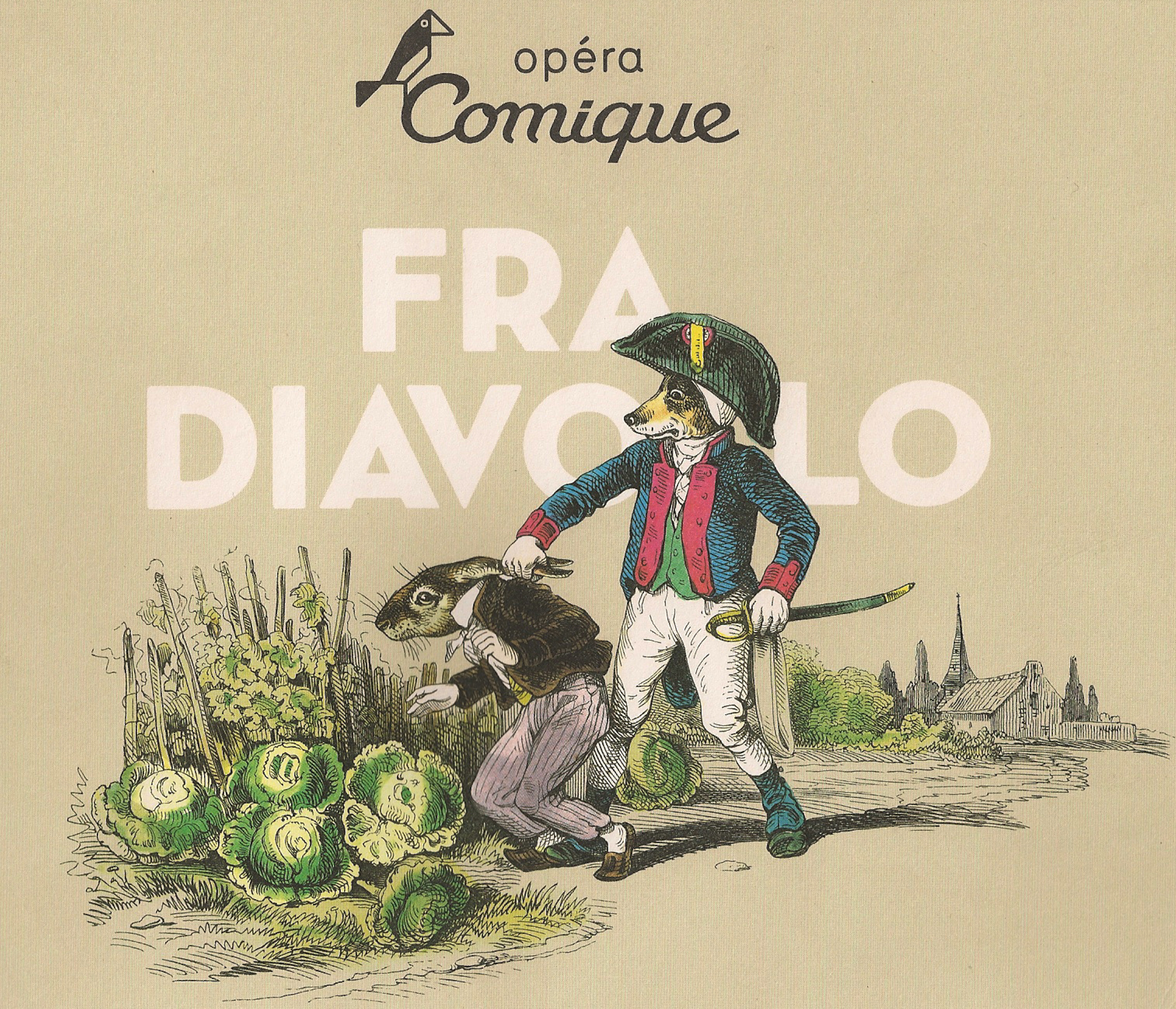 Lithographie "Ah! J 't'y prends mon lapin… à manger les choux du voisin…" - Les Métamorphoses du jour (1828–29) de Grandville